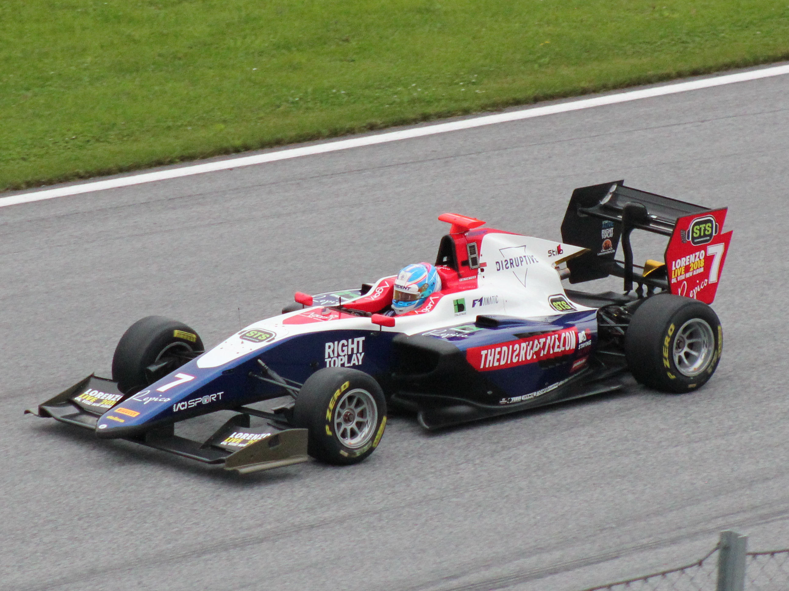 07 Ryan Tveter beim Rennwochenende in Österreich 2018